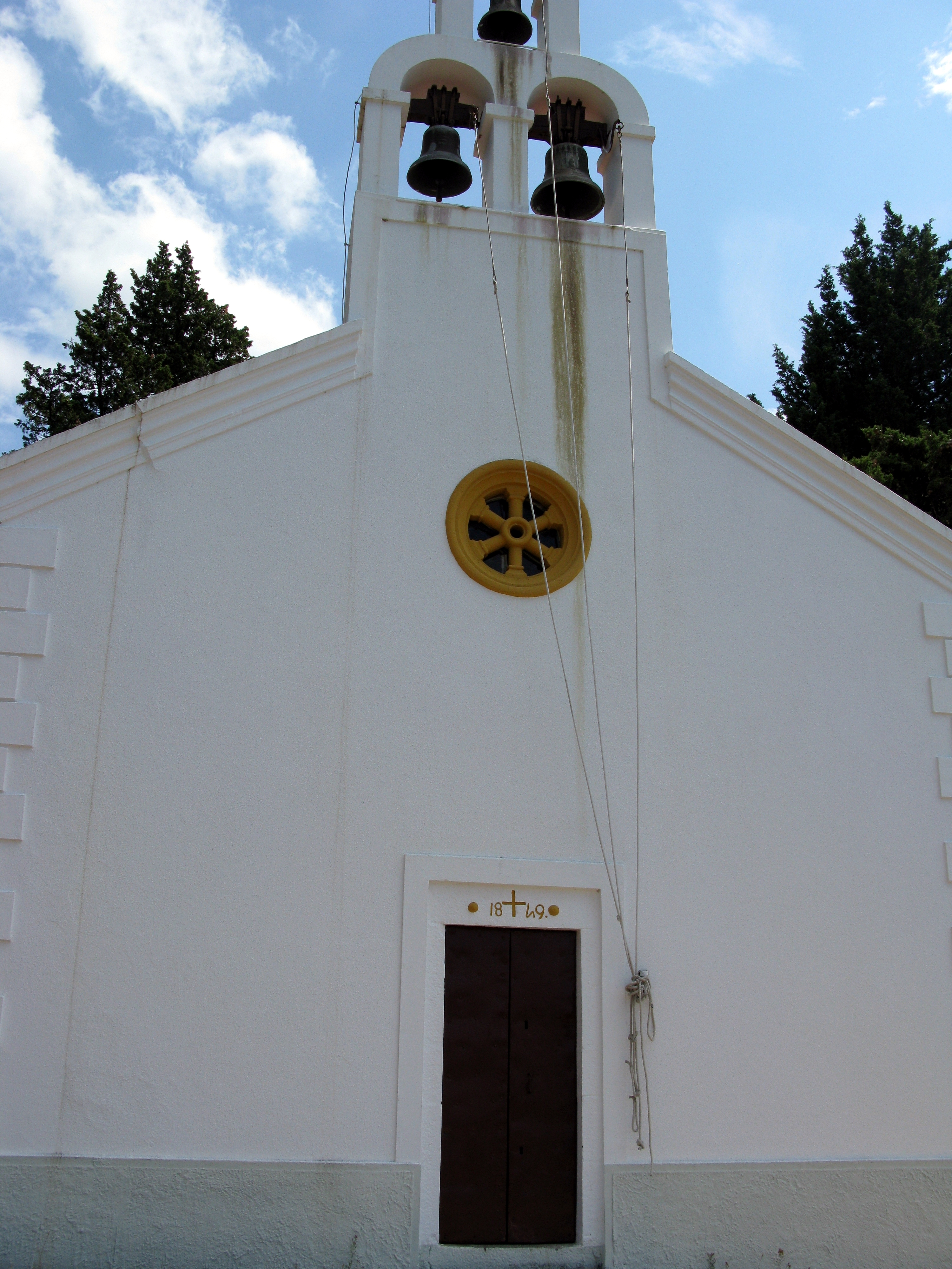 Sveta Petka